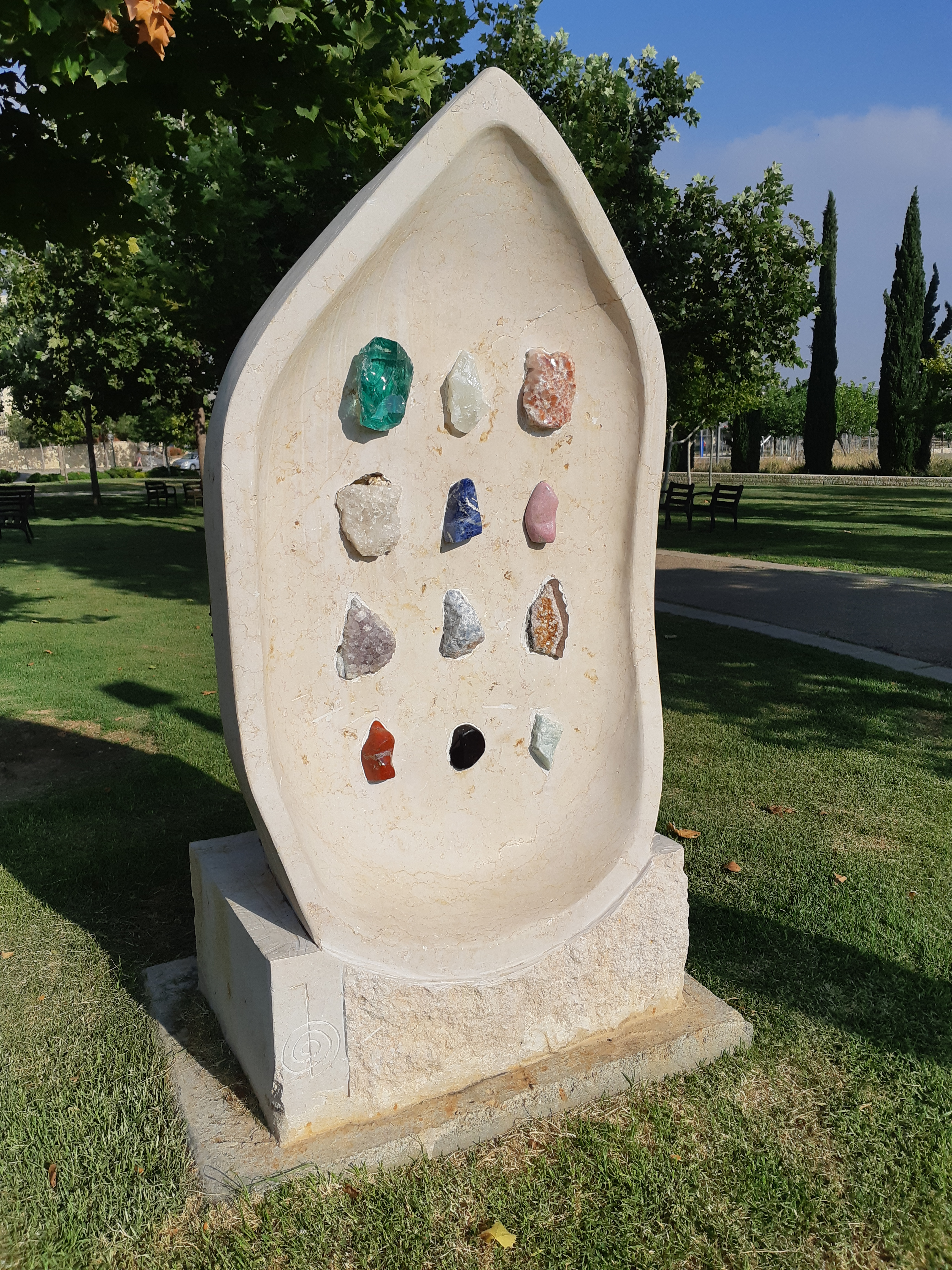 פסל אבני החושן, בצומת הרחובות עמק הזבולון ואבני החושן, בכניסה לשכונת אבני חן, ליד מרכז הספורט העירוני פוסל על ידי אמניםː בן אריה רותי וצוקרמן יוסף בשנת 2009